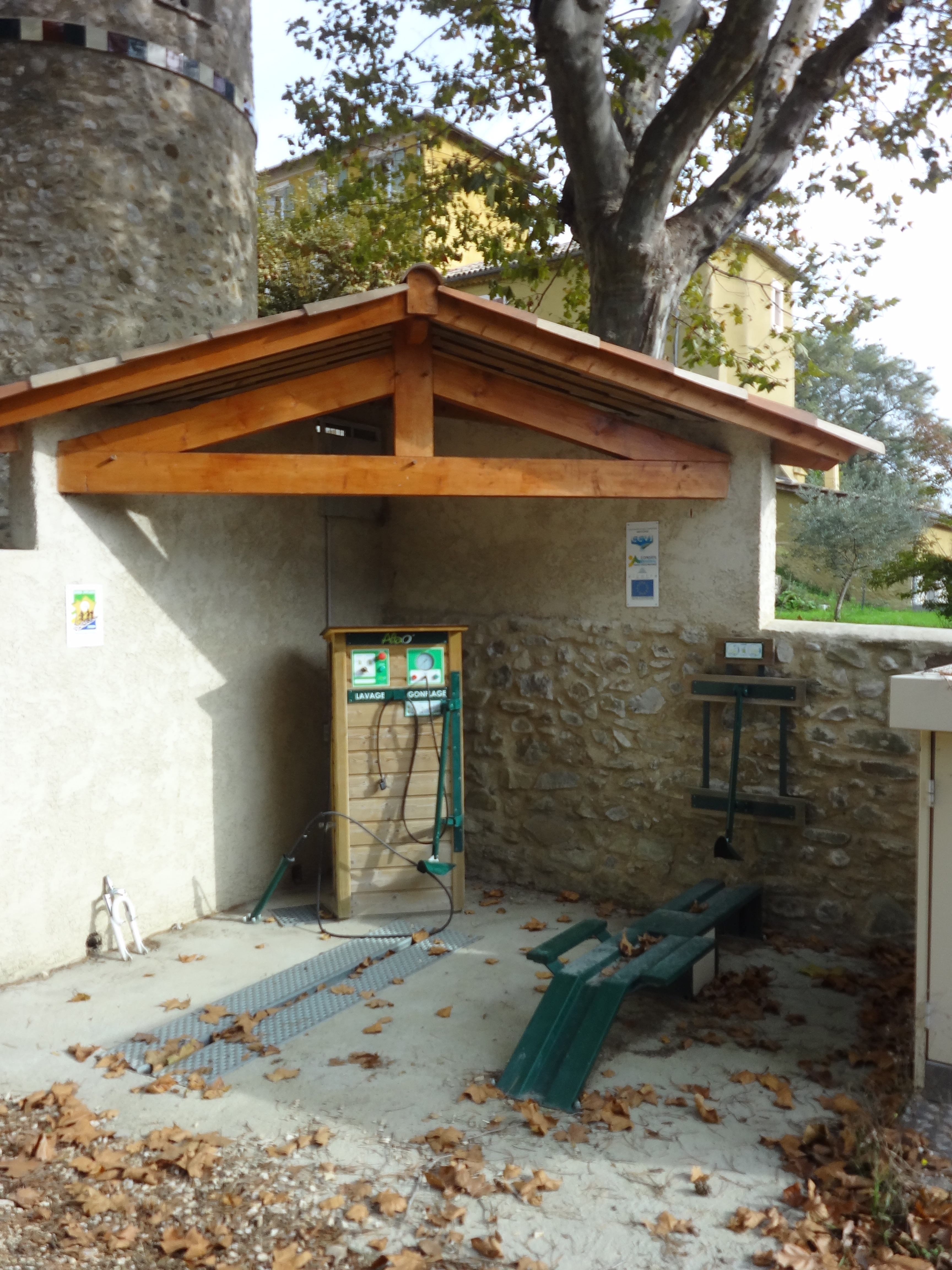 station d’entretien vélo à Bevons